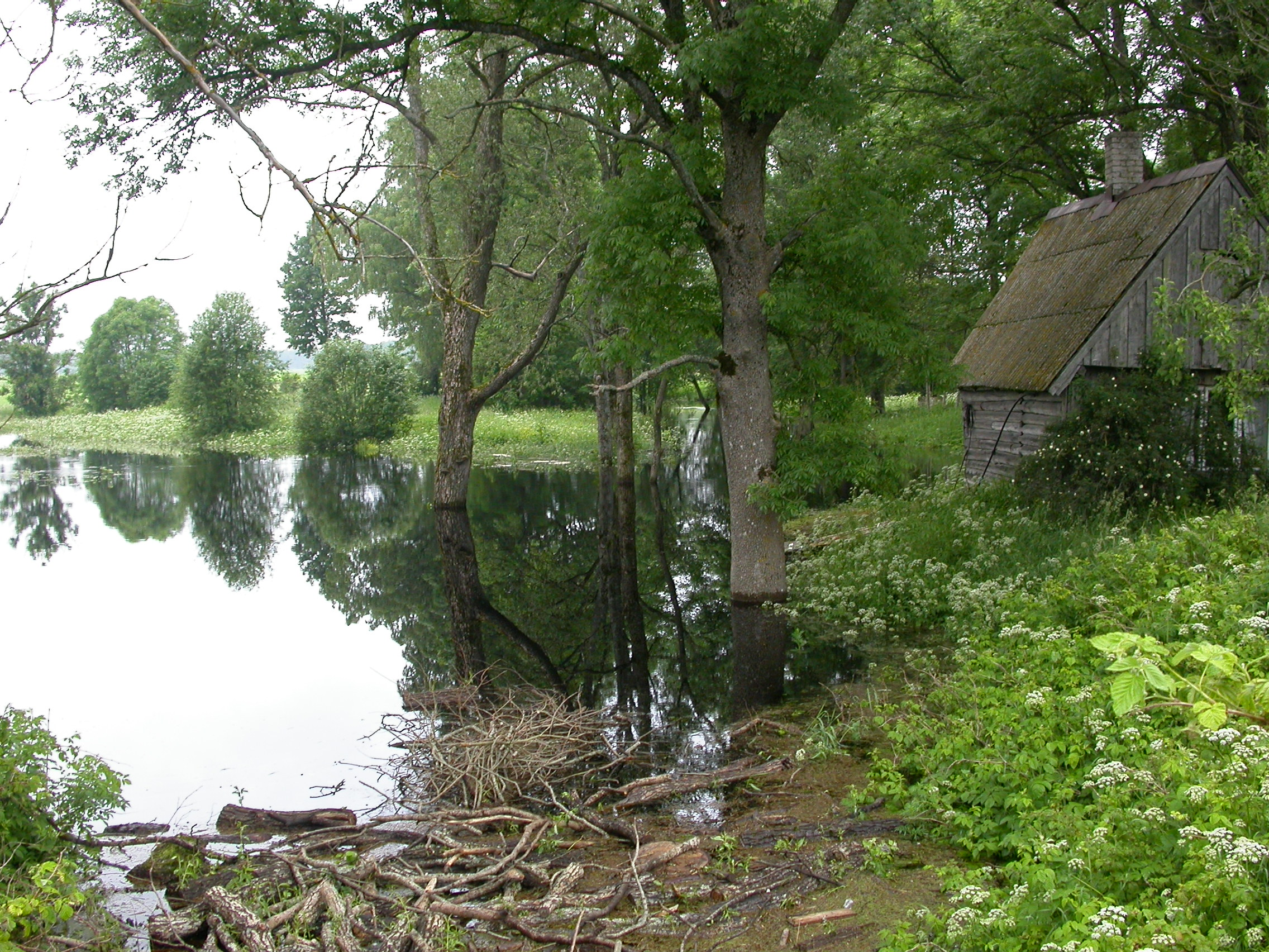 Peegeldus veel.